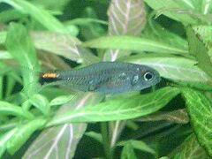 ホタルテトラ（Axelrodia sp.） 尾の斑点がオレンジ色の個体